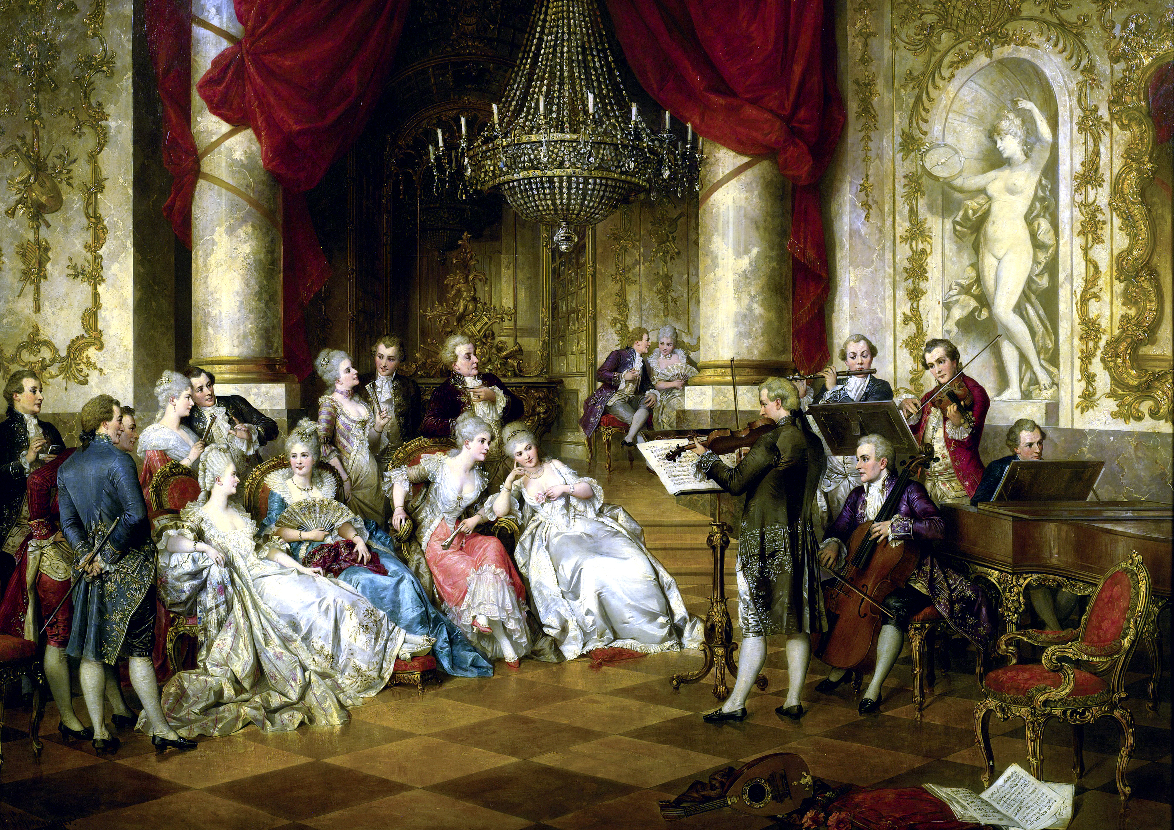 Das Konzert.